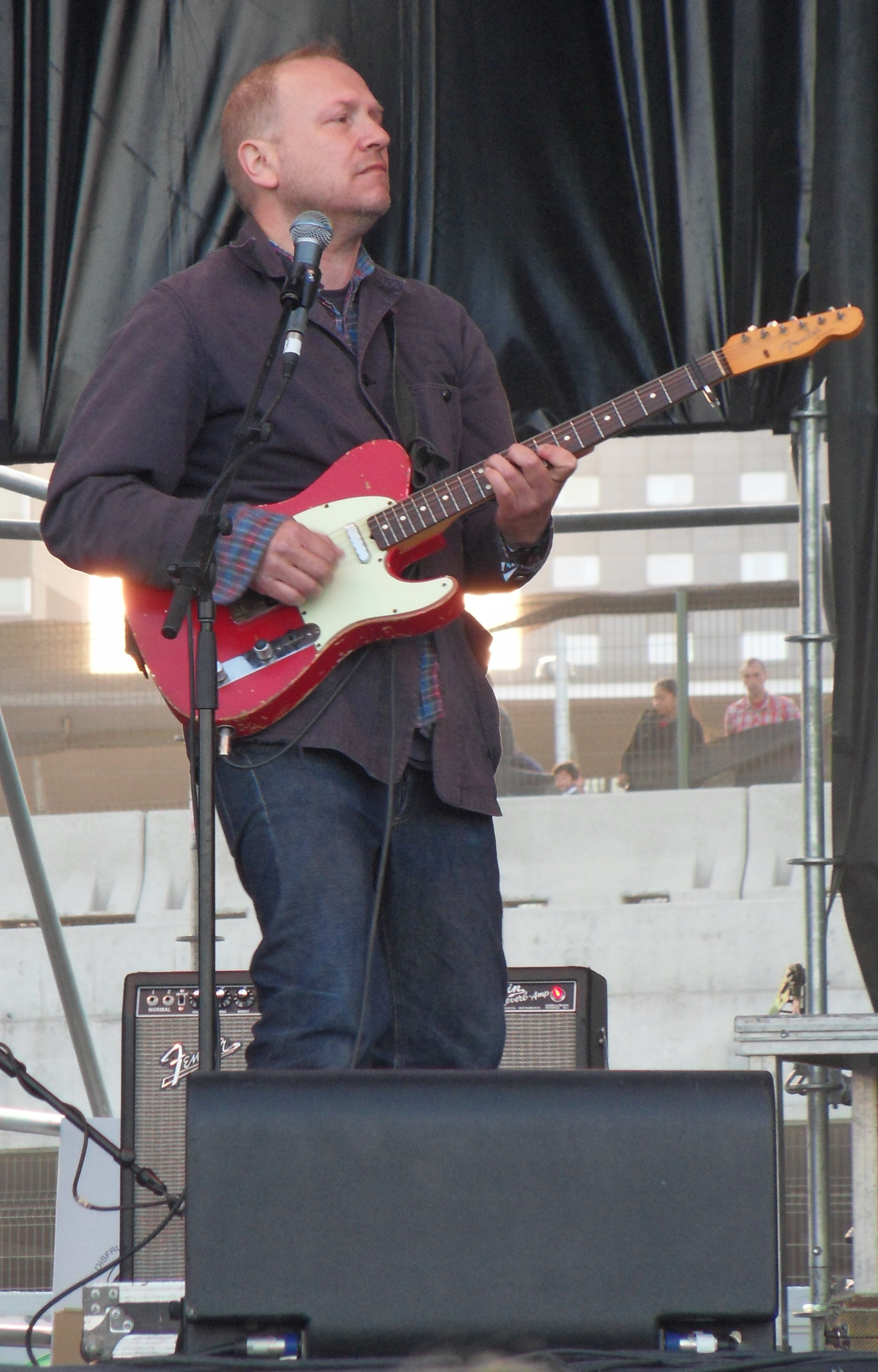 Sam Prekop beim Konzert von The Sea and Cake auf dem Festival Primavera Sound 2013 in Barcelona